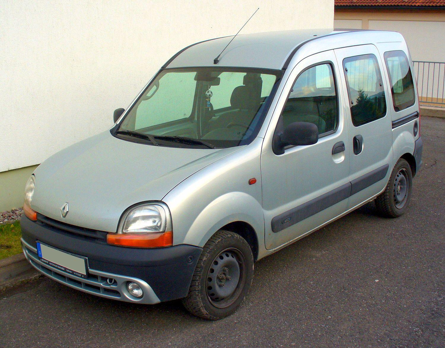 Renault Kangoo I